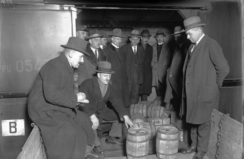 Das erste amerikanische Gold für Deutschland. Auf Grund der Dawes Gesetze schickte die Morgan-Bank zwei Millionen Dollar in Gold mit der Mongolia nach Deutschland. Dasselbe ist für die Reichsbank bestimmt und am 23. Dezember in Berlin eingetroffen. Beamte der Reichsbank beim Verladen des Goldes auf dem Lehrter Bahnhof in Berlin.